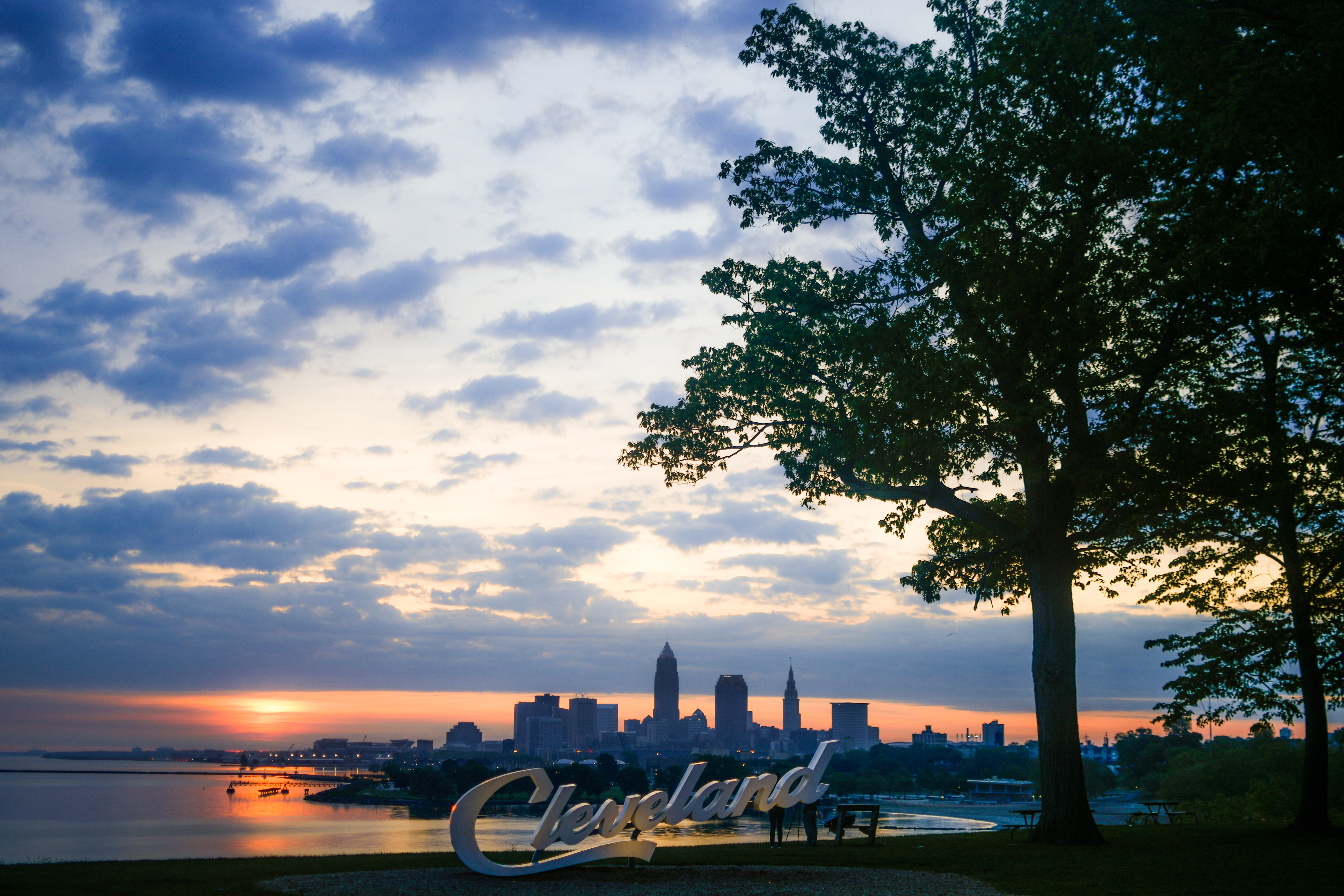 Cleveland Skyline